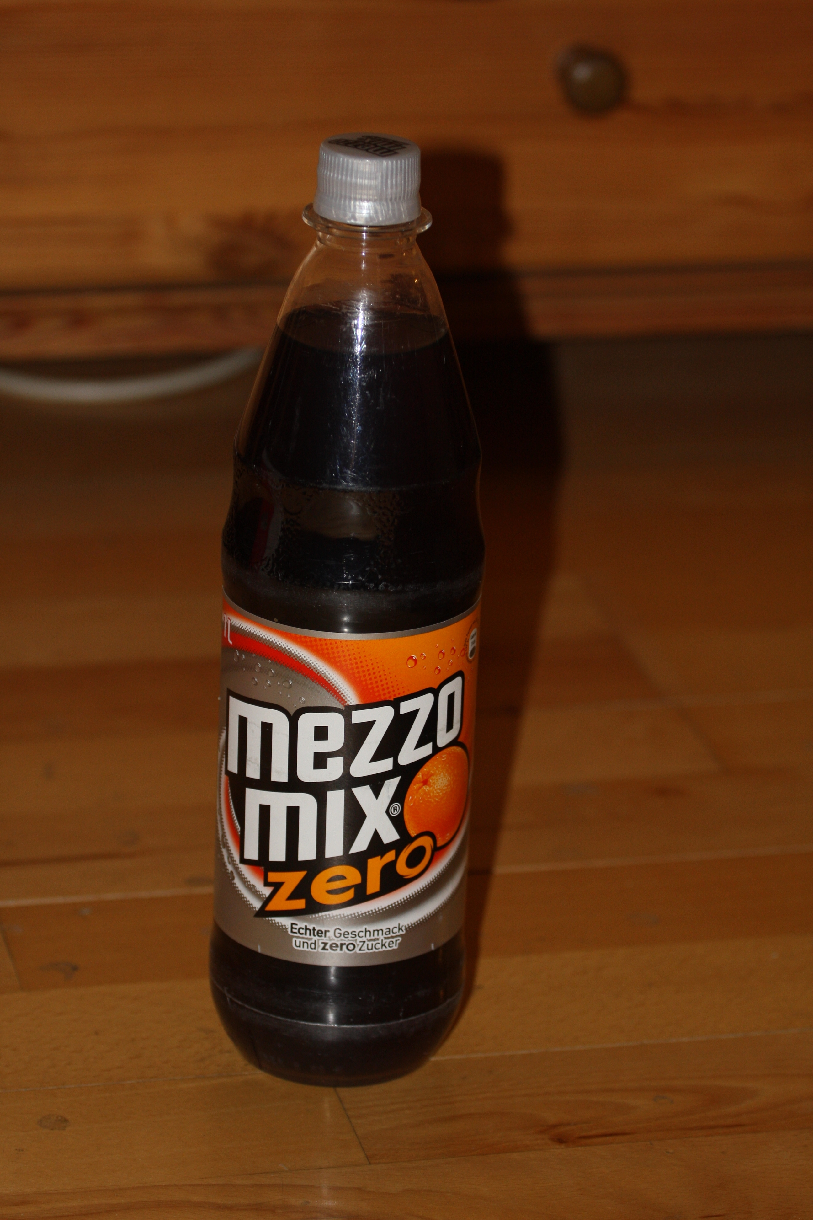 Fles MezzoMix Zero